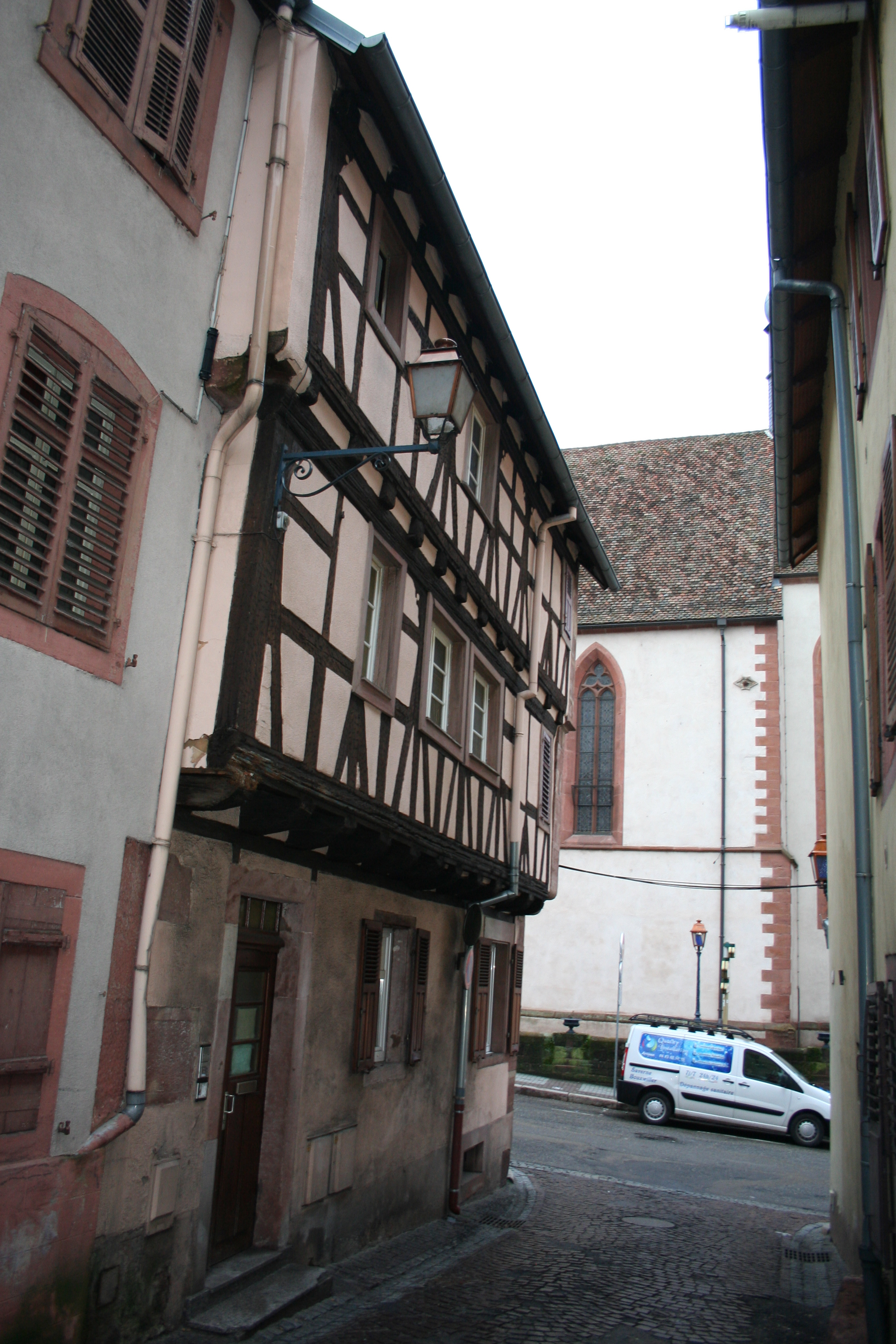 le 01 rue des pères à Saverne, résidence du sous-lieutenant Forstner, protagoniste de l'affaire de Saverne, 1 rue des Pères